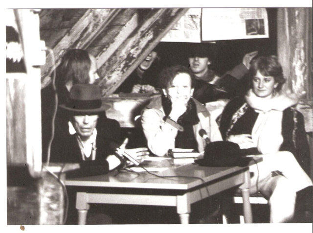 1982, Übernahme der Hauspatenschaft der besetzten Häuser in der Winterfeldstraße, Berlin. Hella Santarossa und Joseph Beuys